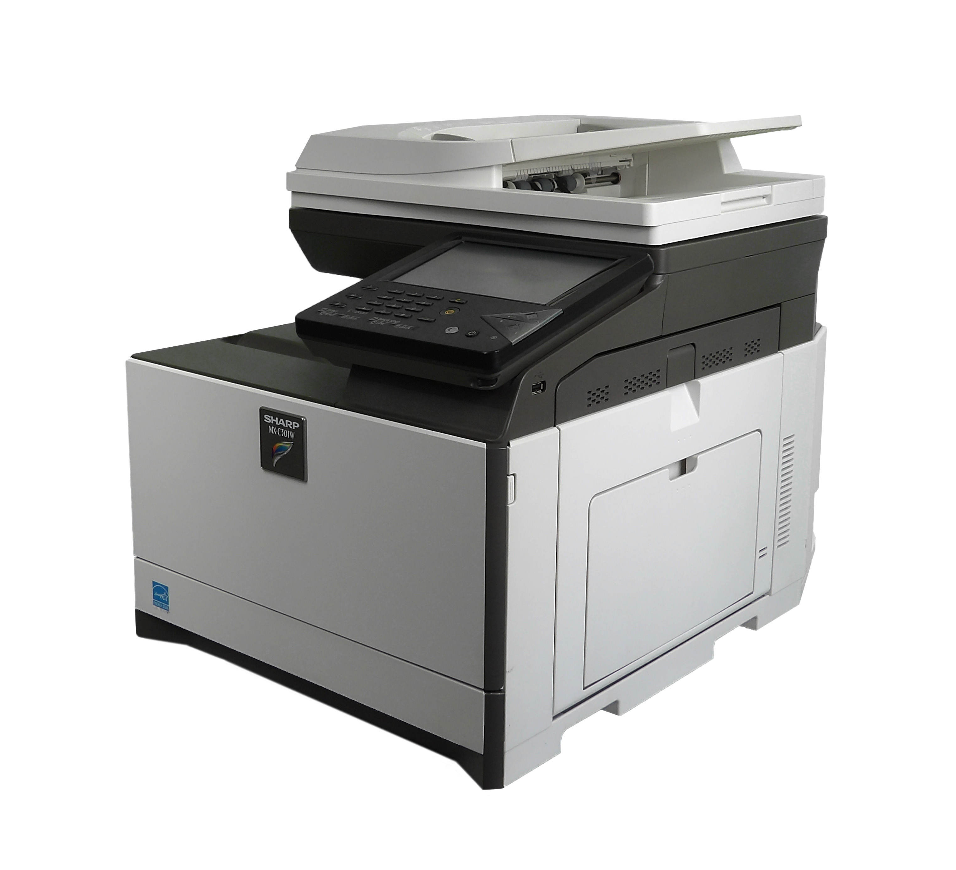 SHARP MXC 301 W Multifonction